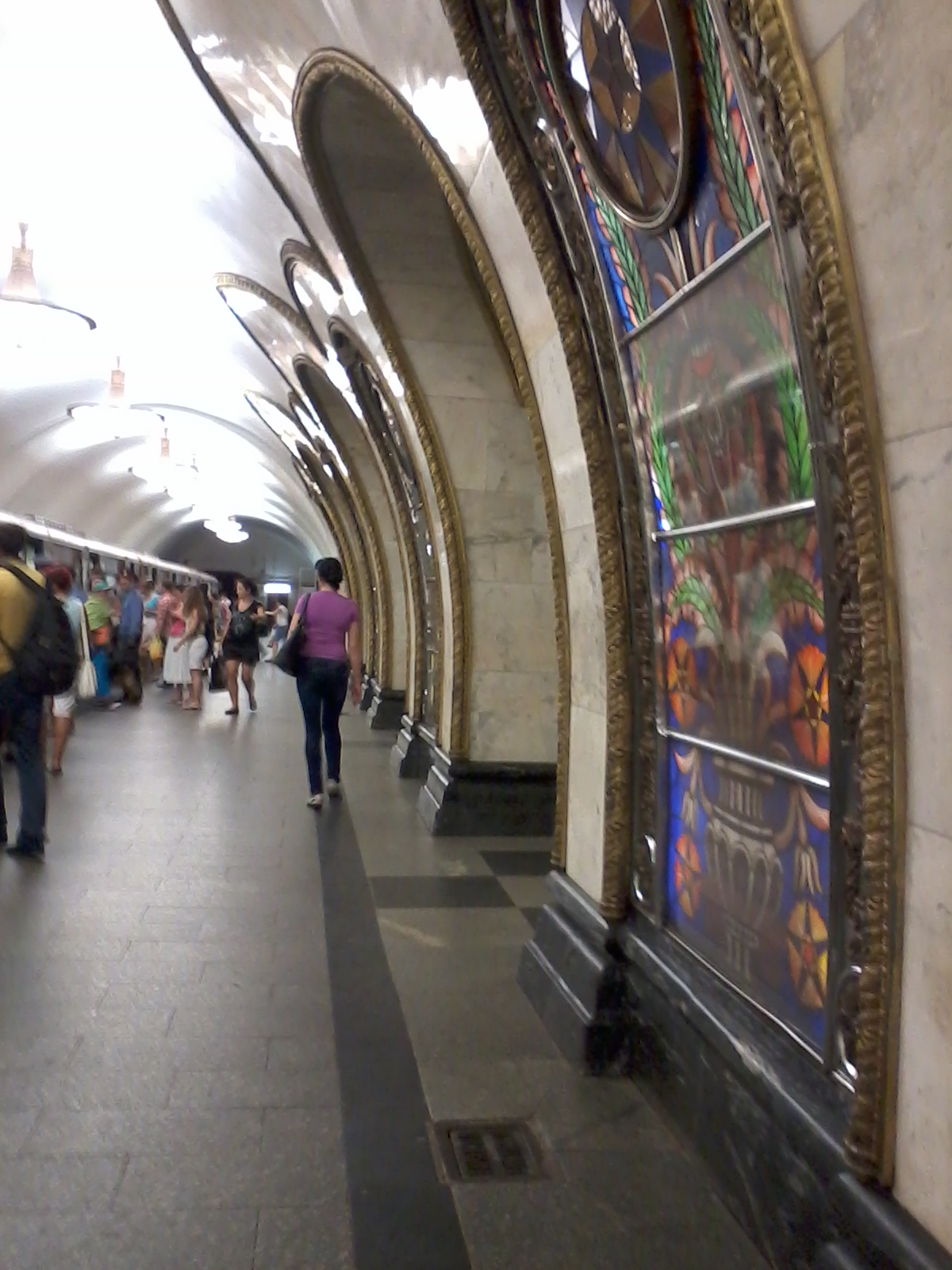 Московское метро, Кольцевая линия, станция Новослободская. Центральный зал